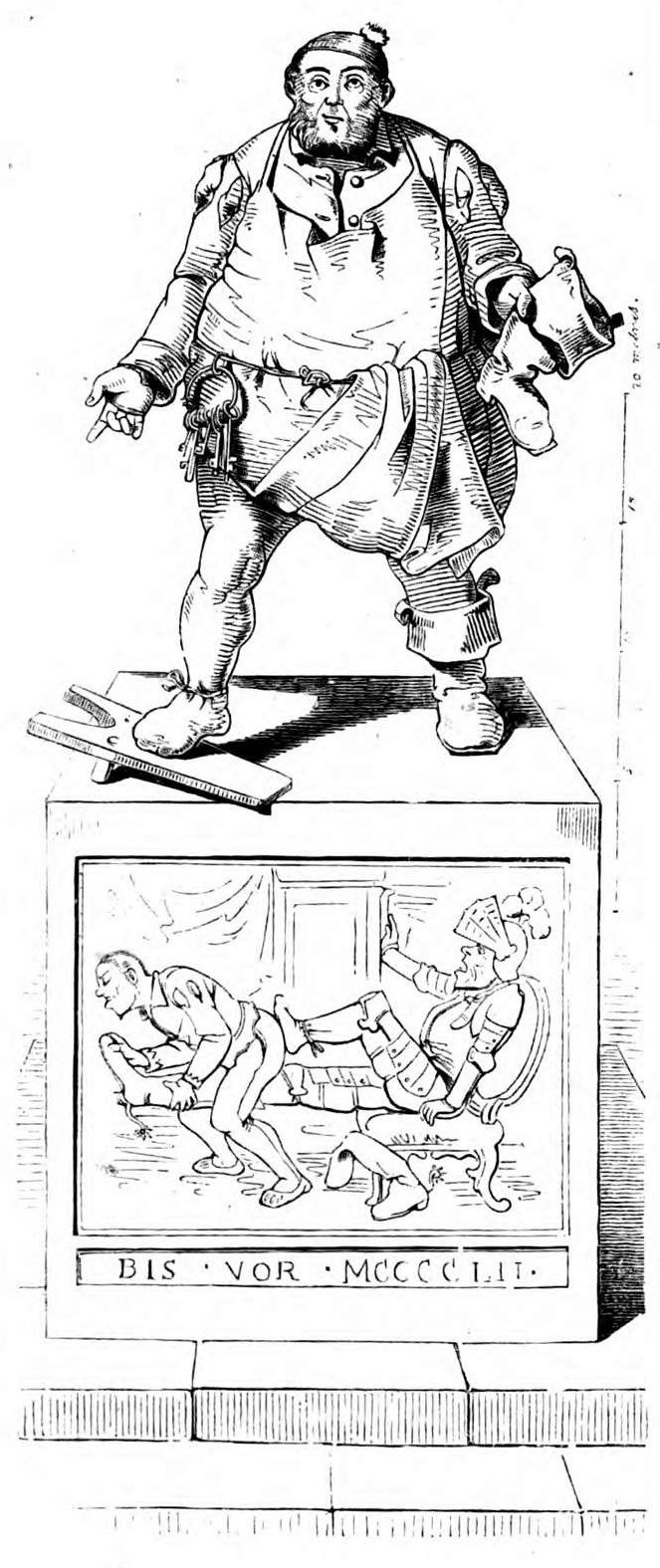 Fliegende Blätter, Volume 1, image on page 88